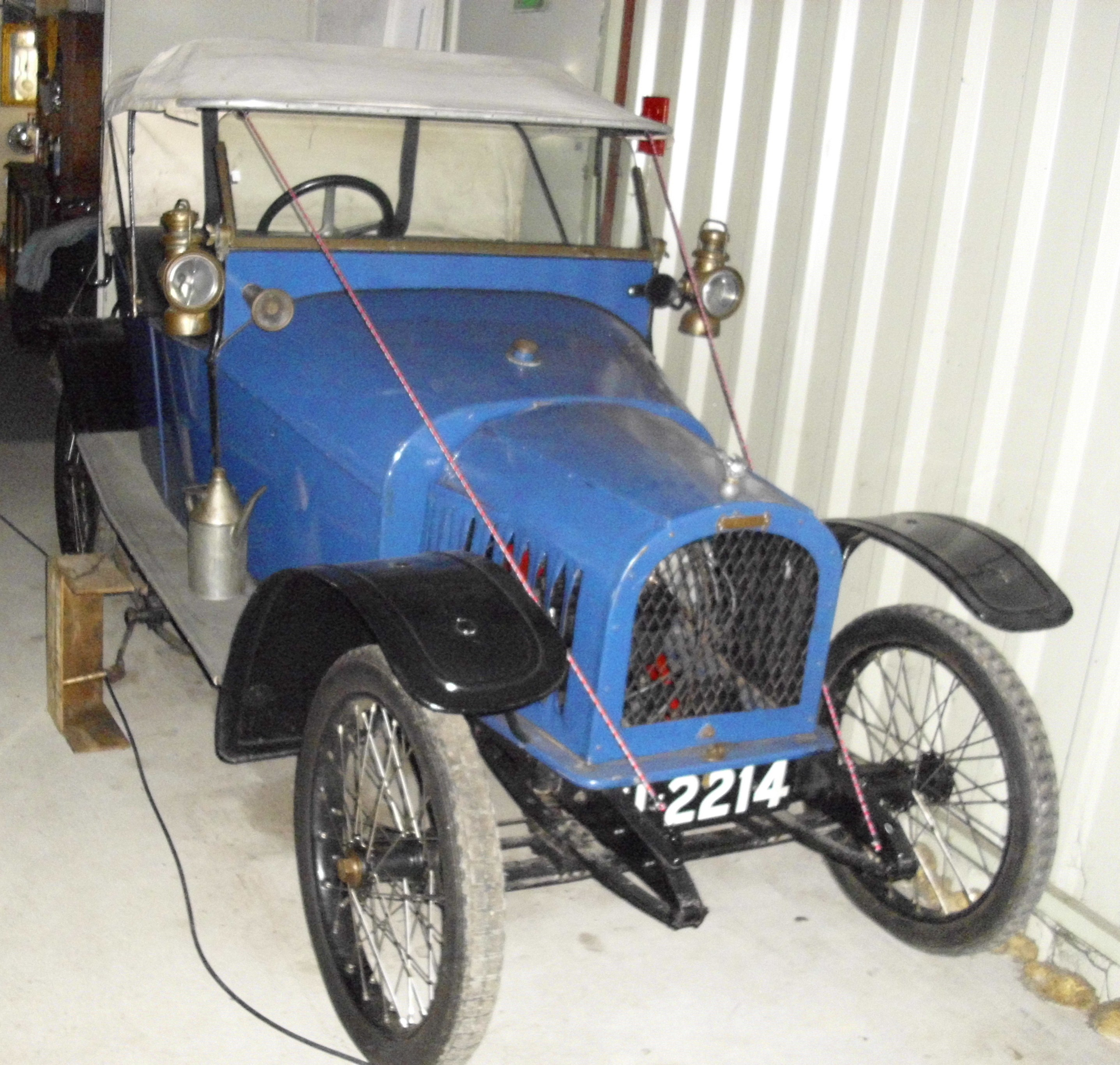 Warne 1913 im Automobilmuseum Stainz